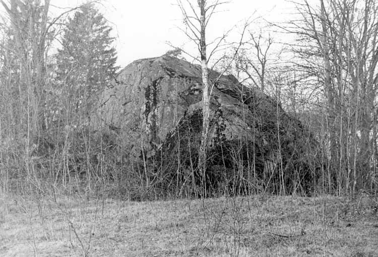 Det stora kluvna flyttblocket nära stranden vid Lugnhamn som givit platsen dess tidigare namn, Klomsten, i Stäket i nuvarande Järfälla kommun.